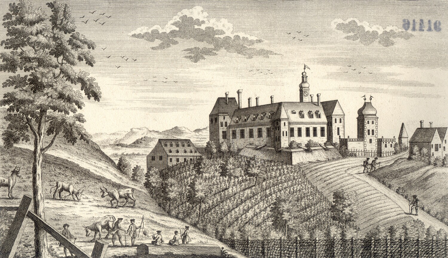 Schloss Fünfkirchen - Prospectus arcis Steinachbrunensis